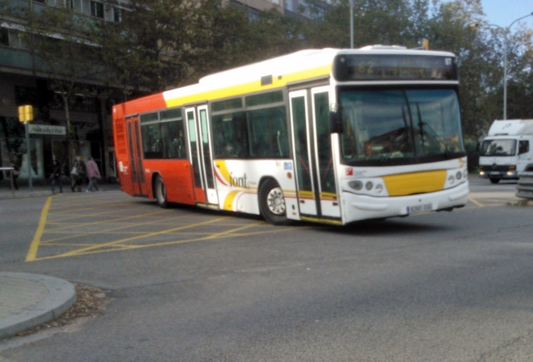 Autobús interurbà/urba a Barcelona